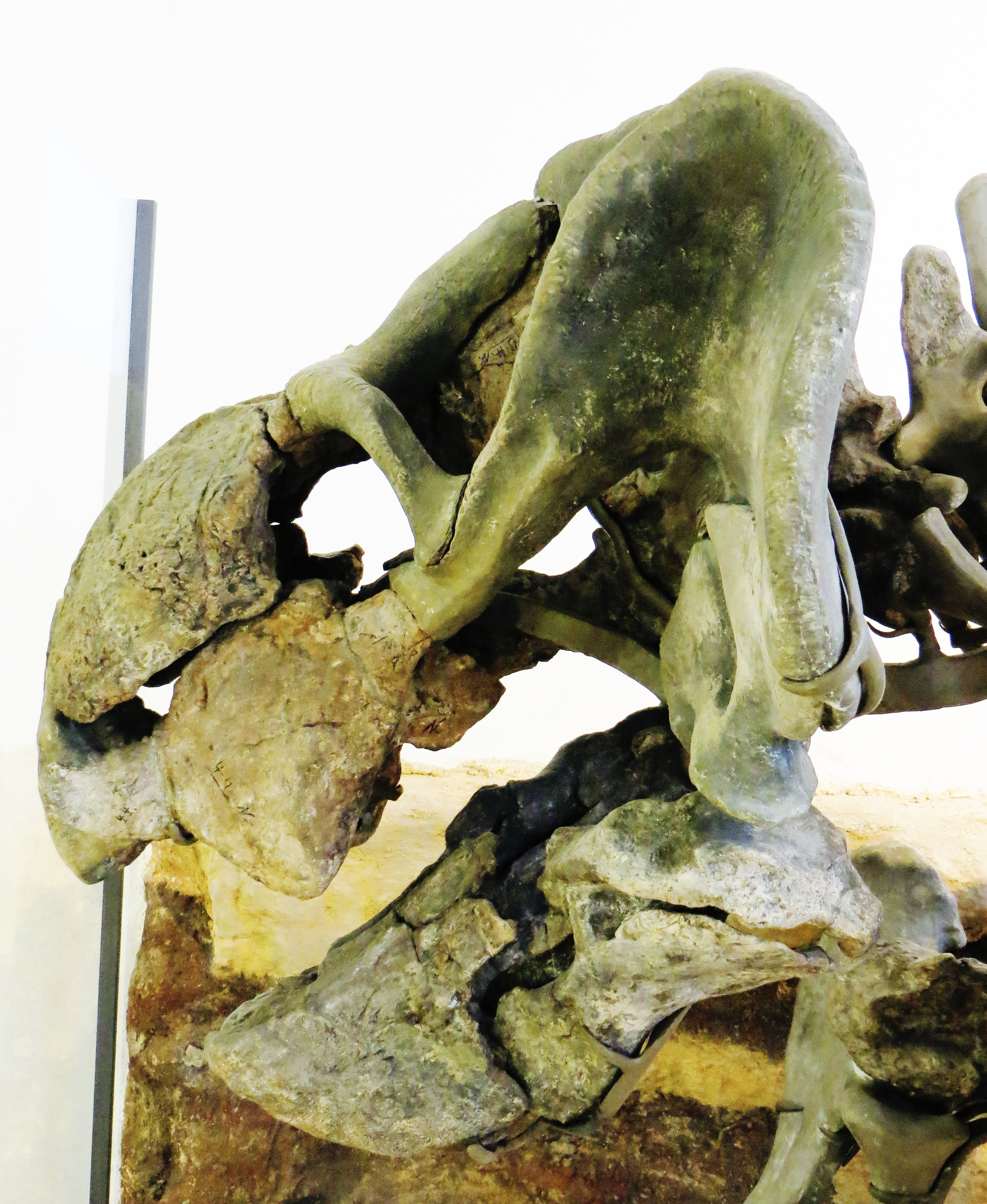 Fossil of Stahleckeria, an extinct therapsid - Took the picture at Museum of Paleontology, Tuebingen